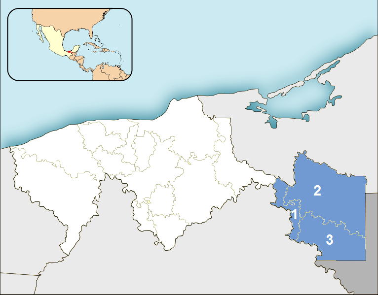 Mapa de la Sub Región de los Ríos, en el estado de Tabasco